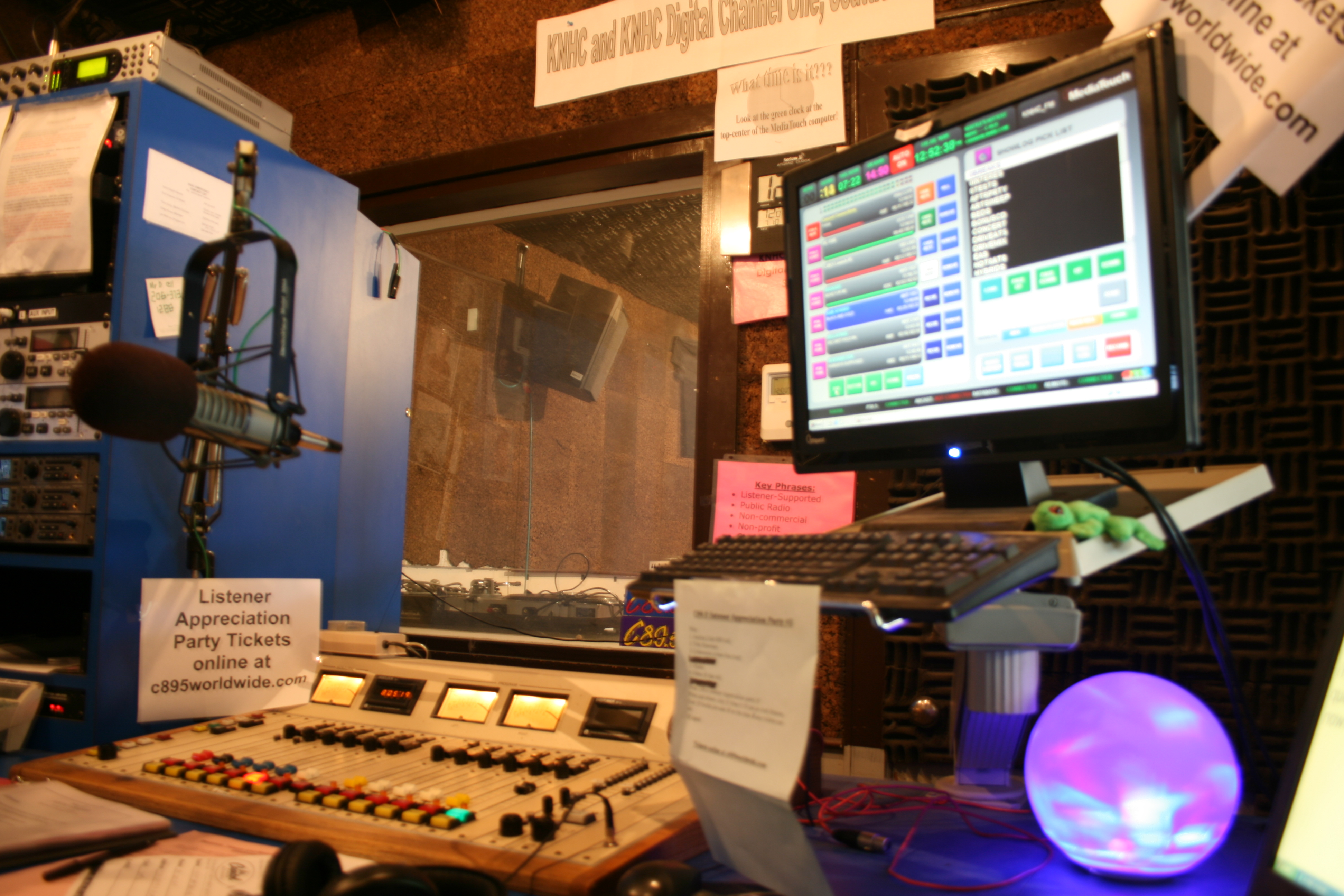 KNHC-FM digital studio A